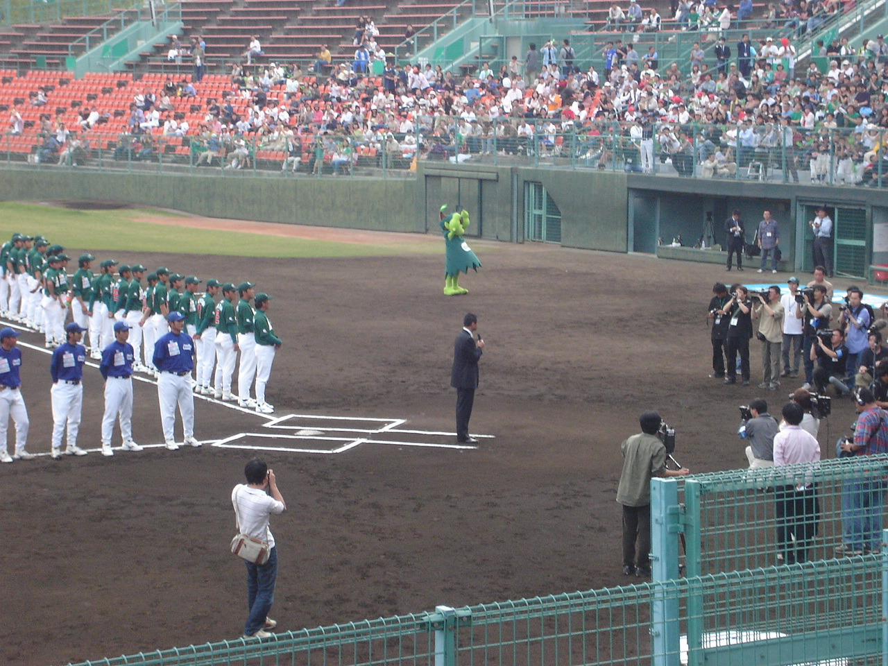 香川県営野球場。 - 日本国香川県高松市にある野球場。